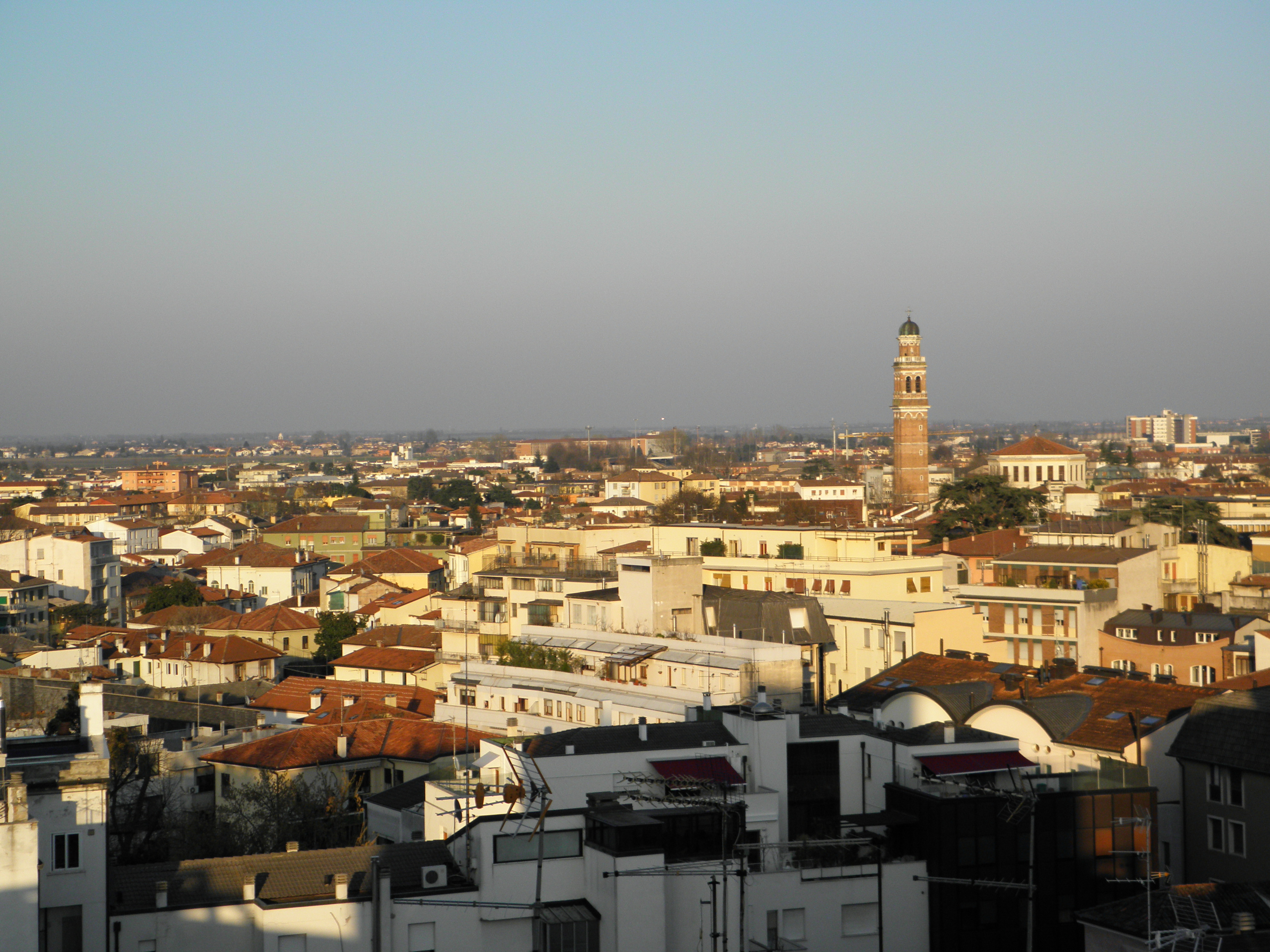 Rovigo: vista della città dal "grattacielo", l'edificio abitato più alto della città.